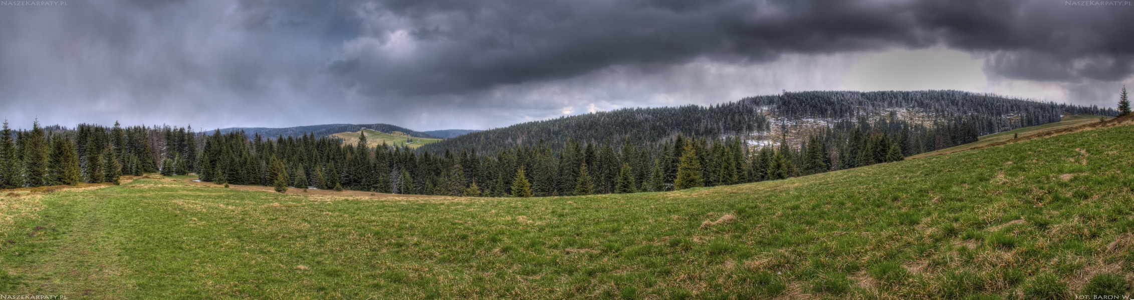 Czoło Turbacza (1258 m n.p.m.) – piąty pod względem wysokości szczyt w Gorcach leżący w masywie Turbacza.